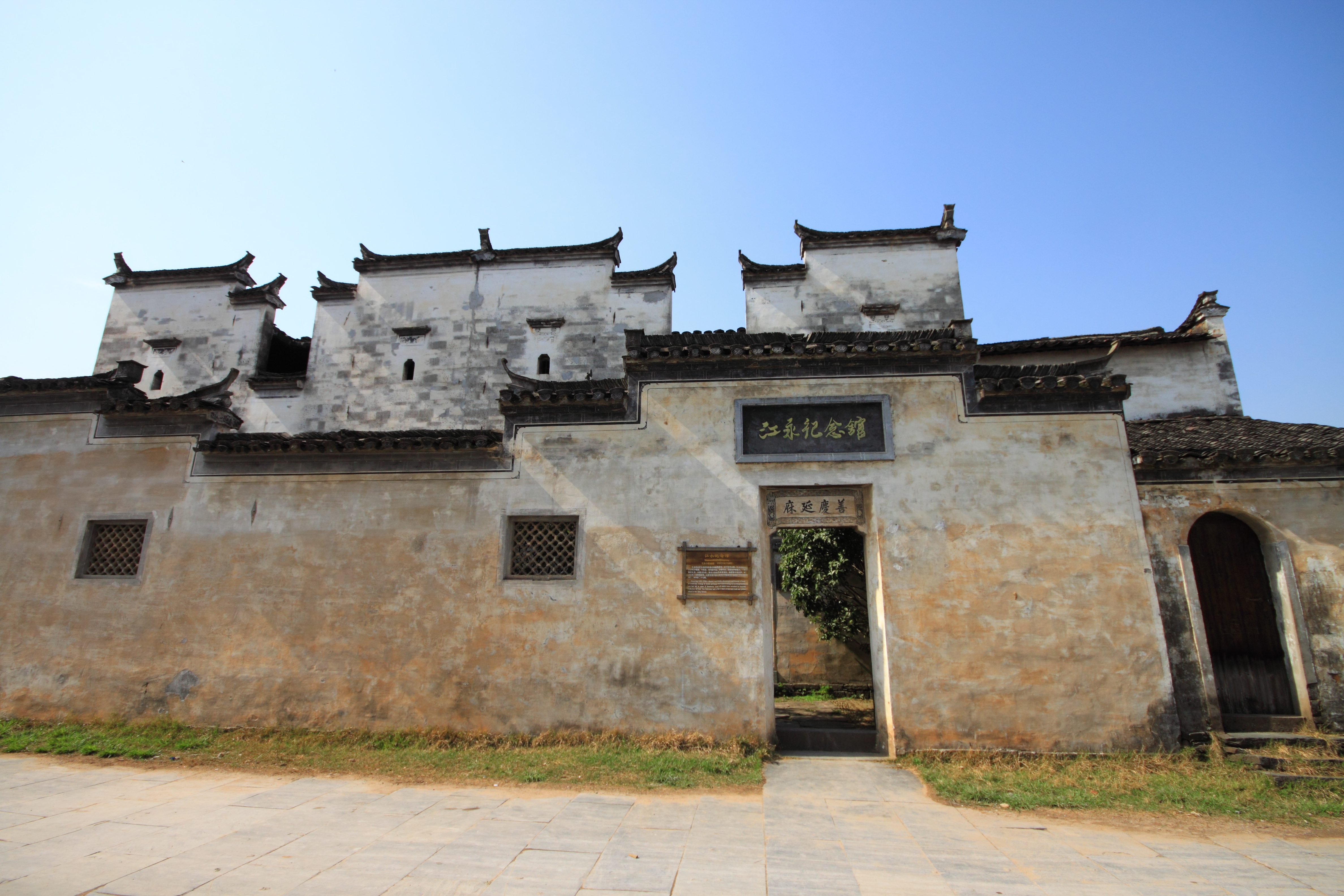 江湾村善余堂（江永纪念馆）受经堂，位于中国江西省婺源县。